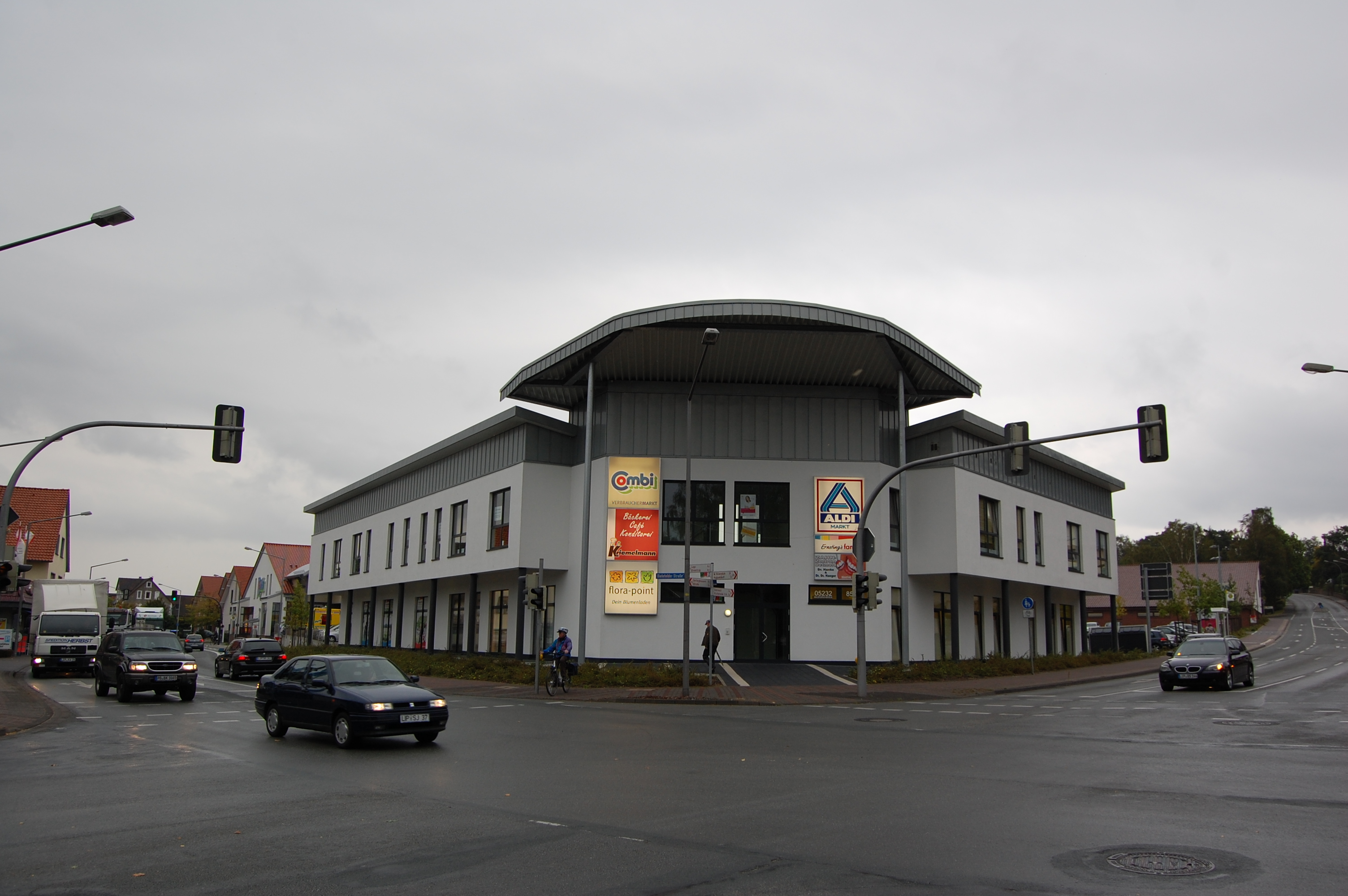 Das Einkaufszentrum in Detmold-Pivitsheide V.L. am ehemaligen Eichenkrug